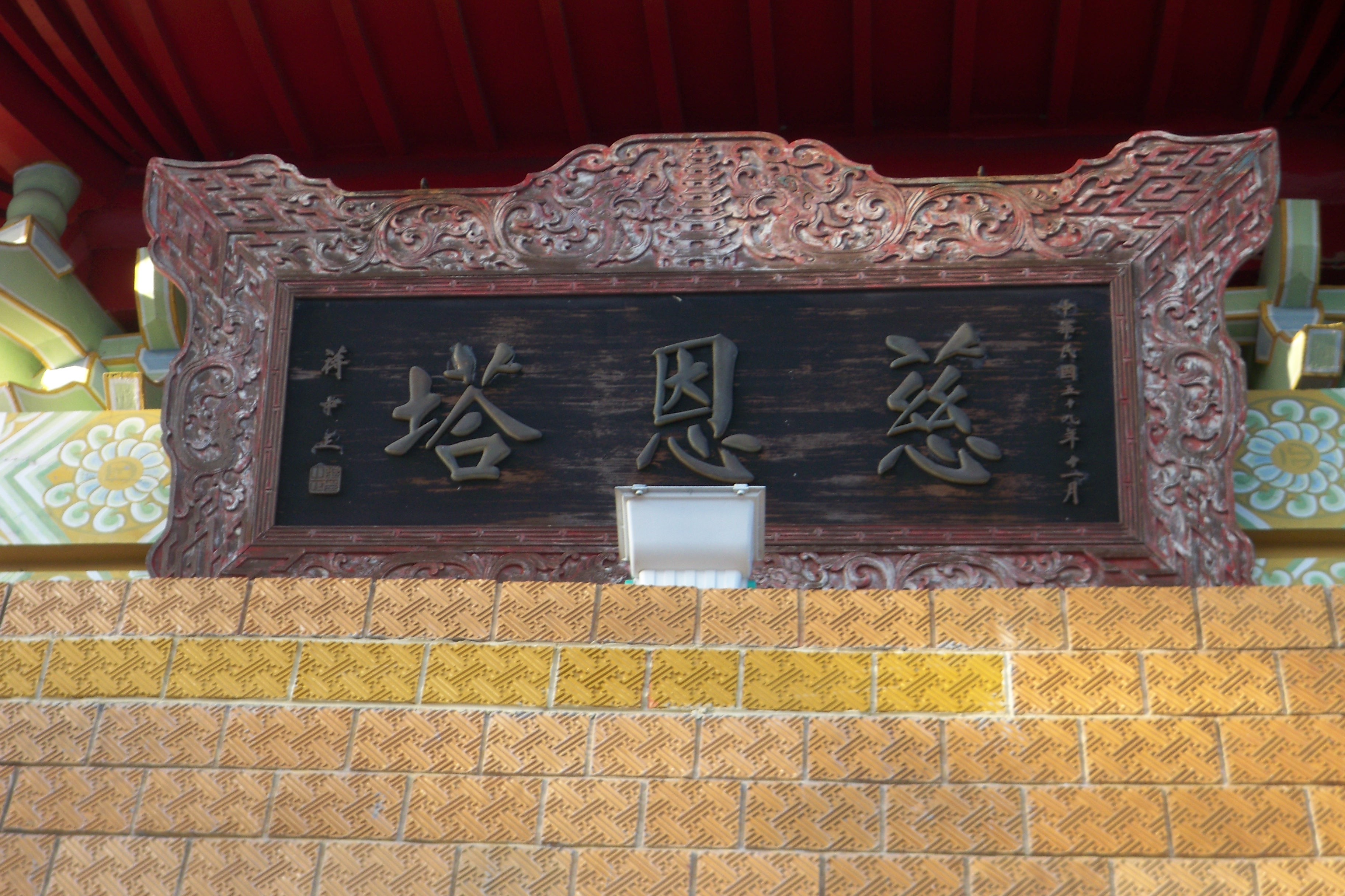 南投縣魚池鄉慈恩塔